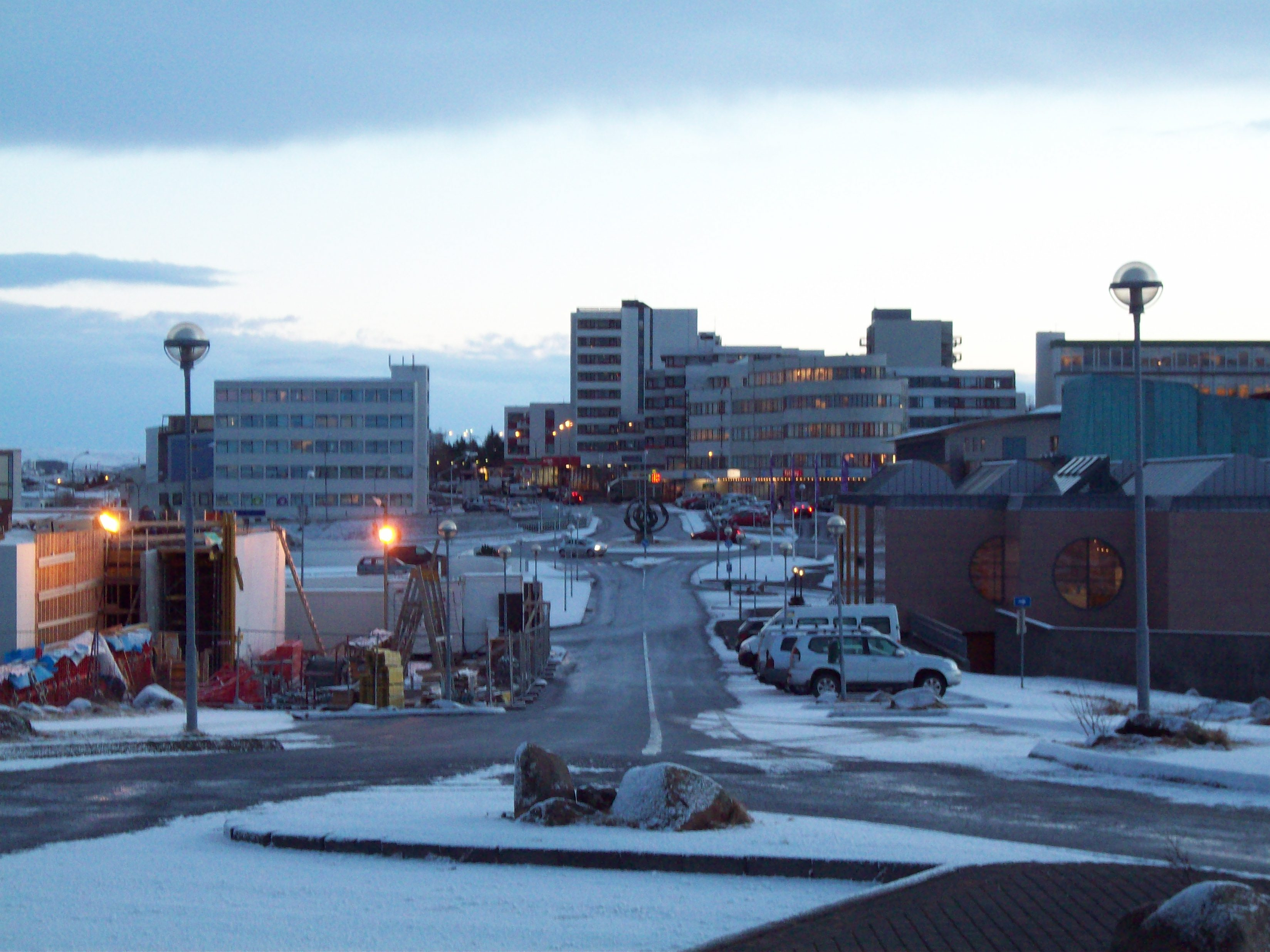 Hamraborgin í Kópavogi